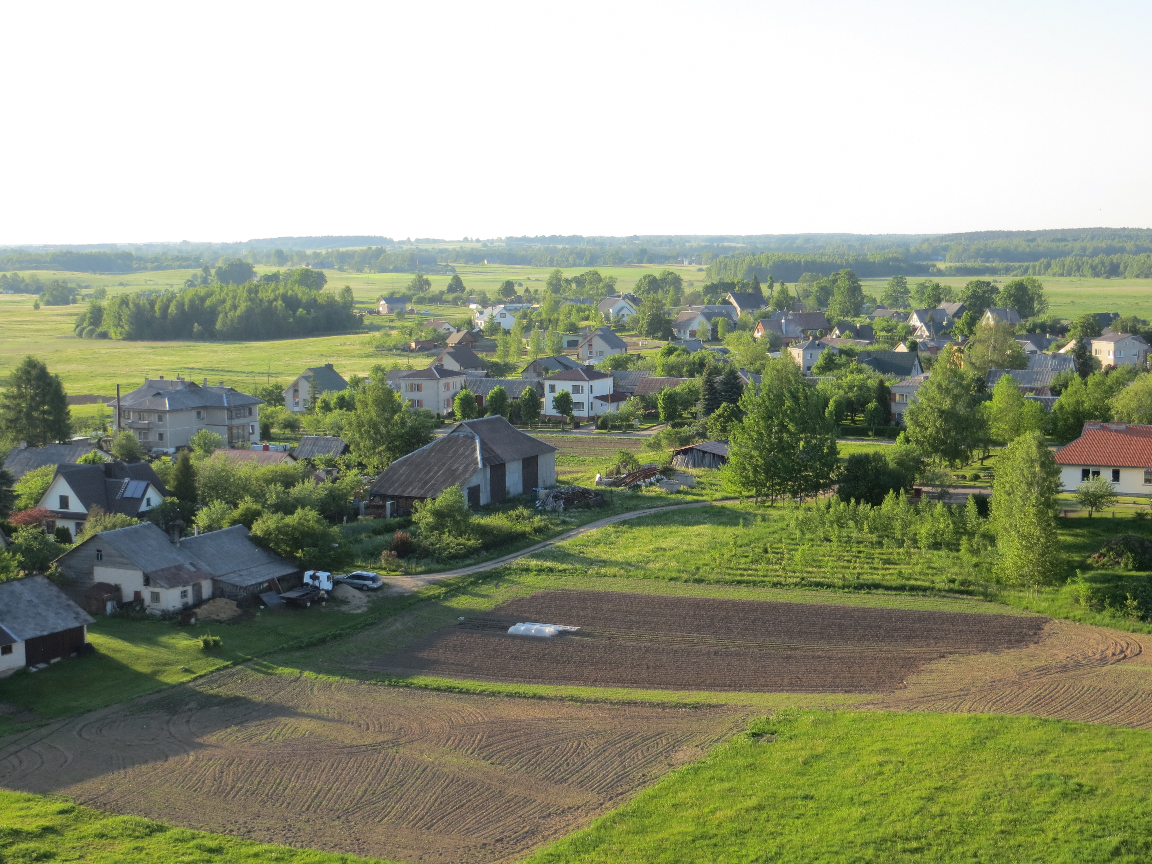 Kijėliai, Lithuania